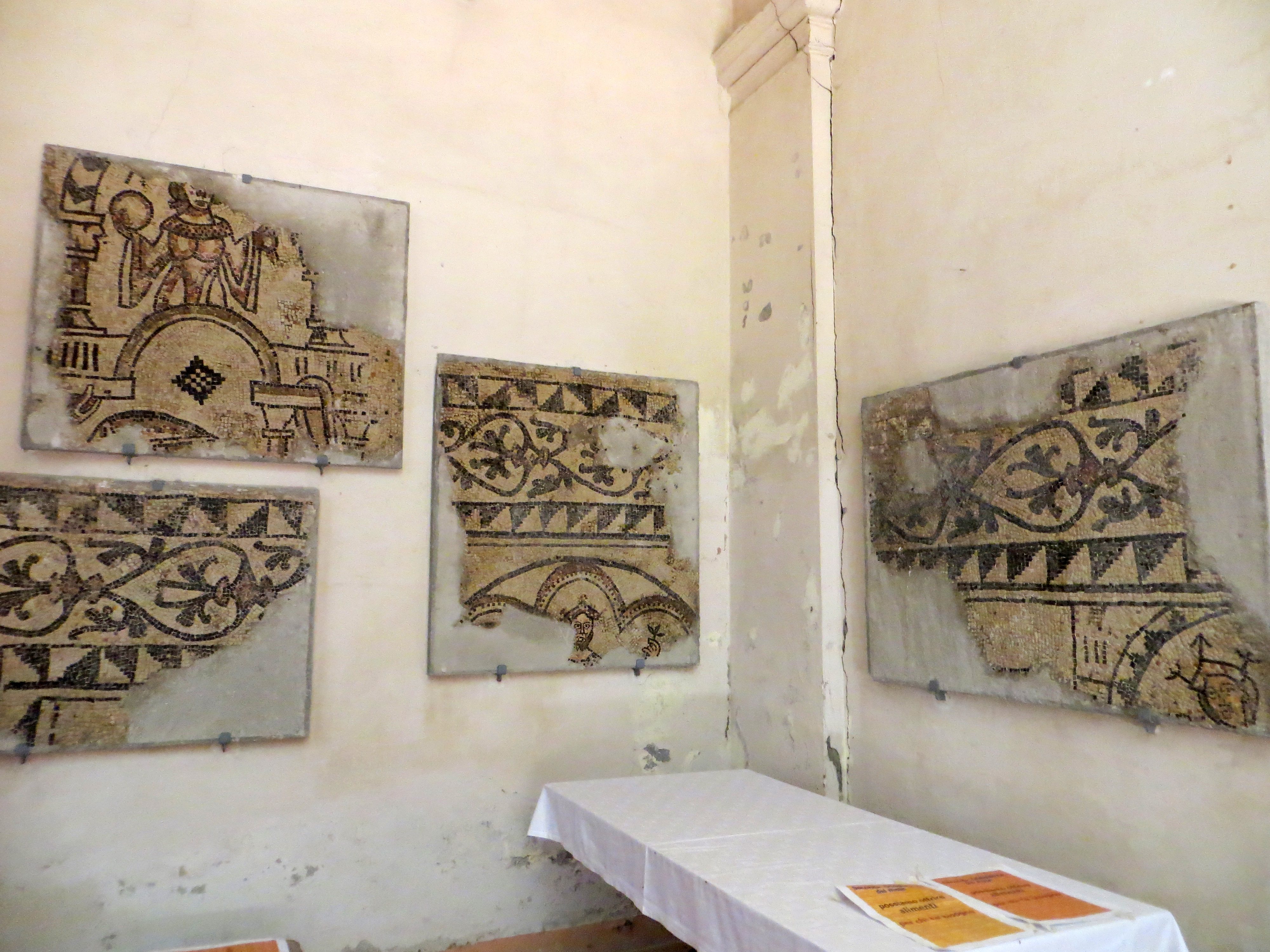 Monastero di Santa Maria Assunta (Castione Marchesi, Fidenza) - mosaici medievali